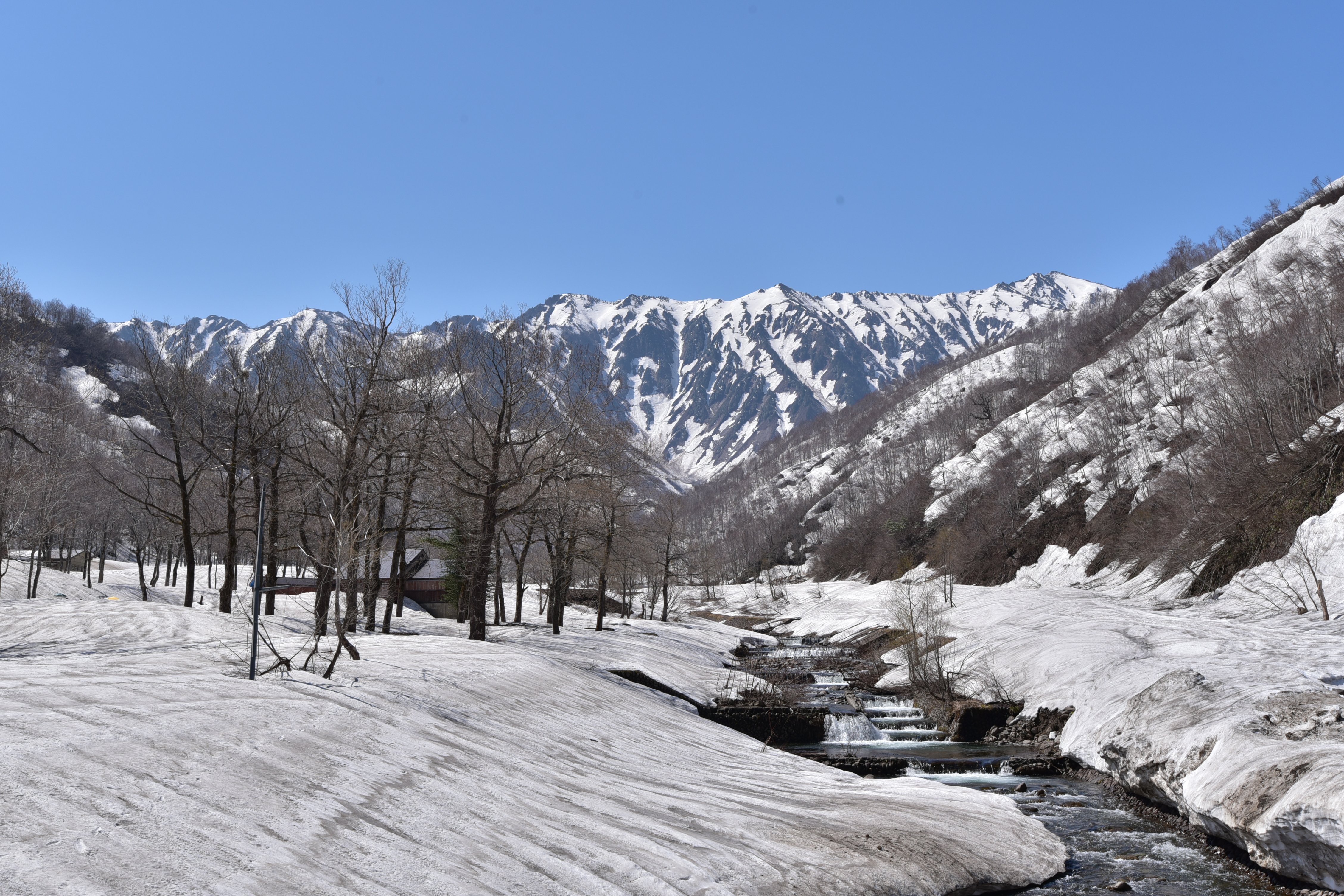 新潟県魚沼市銀山平の国道352号から見た中荒沢。奥の中央が花降岳、右端の高いピークが荒沢岳。